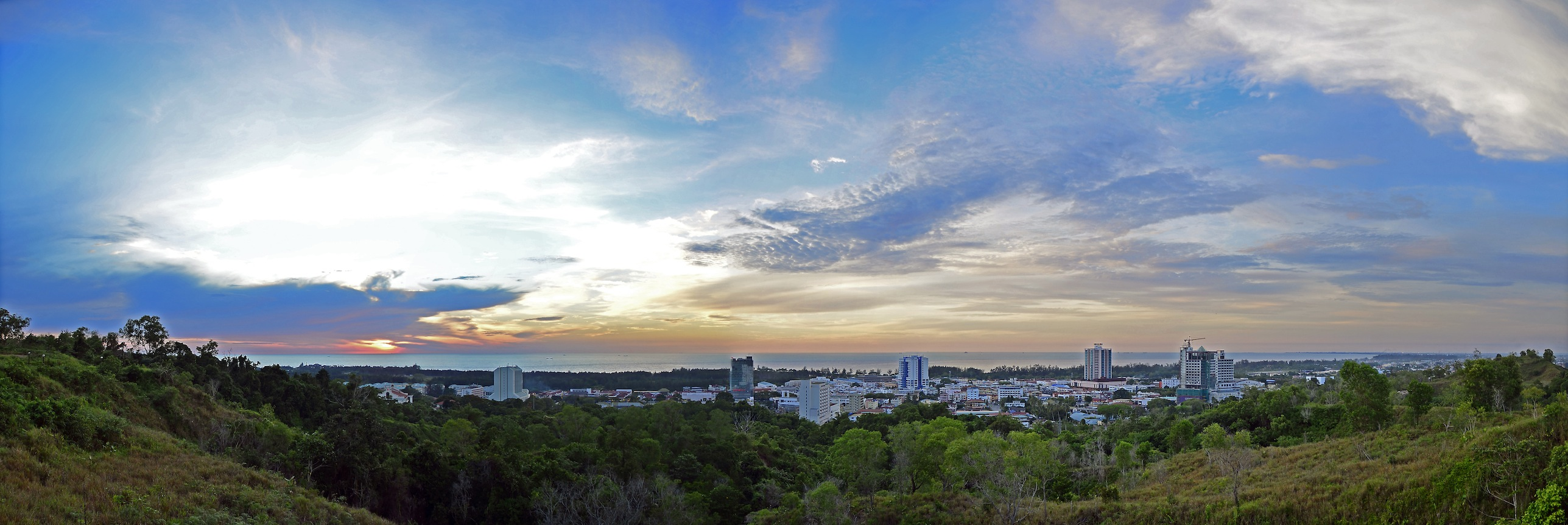 Canada Hill, Miri, Malaysia